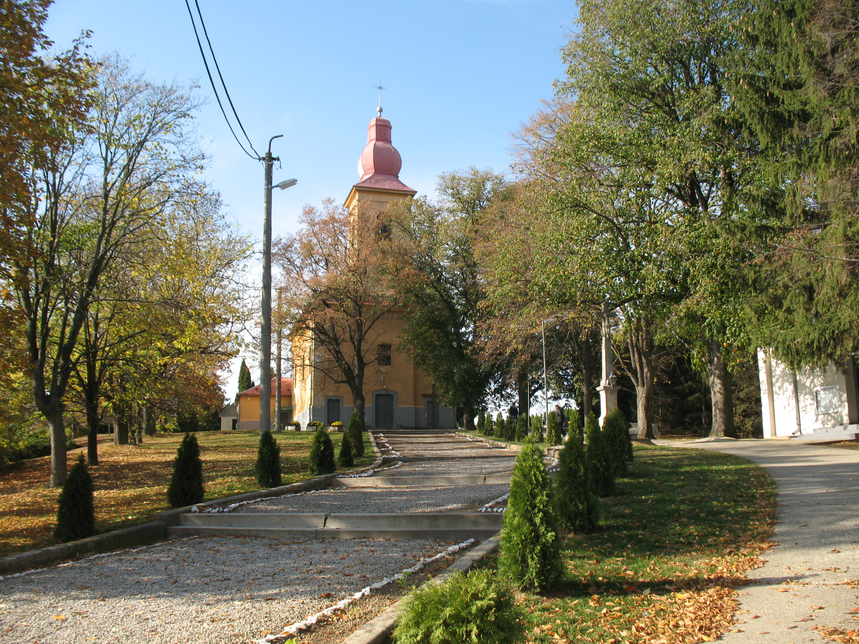 Zsitvaújfalu